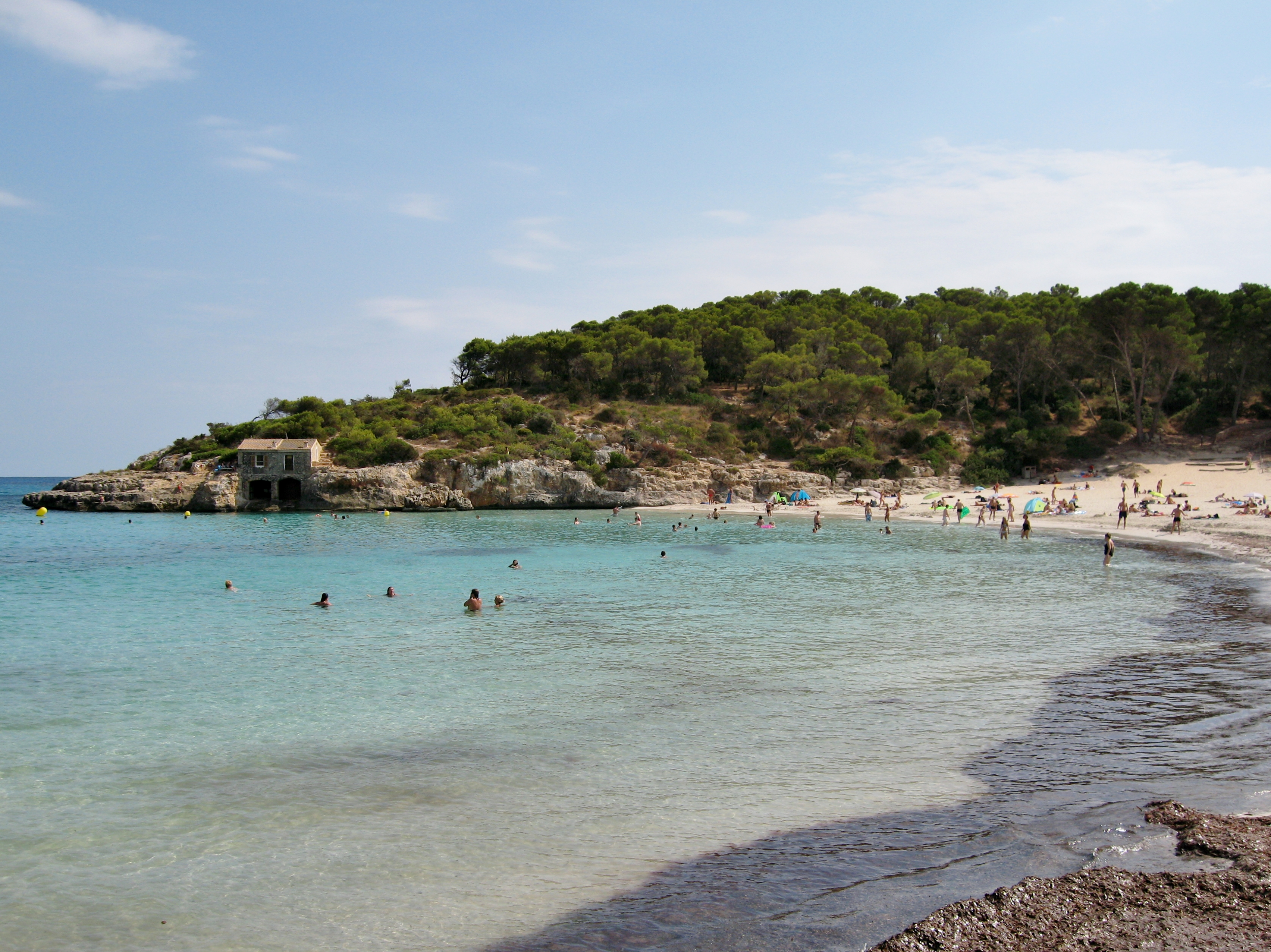 S’Amarador, Strand an der Cala Mondragó, Gemeinde Santanyí, Mallorca, Spanien